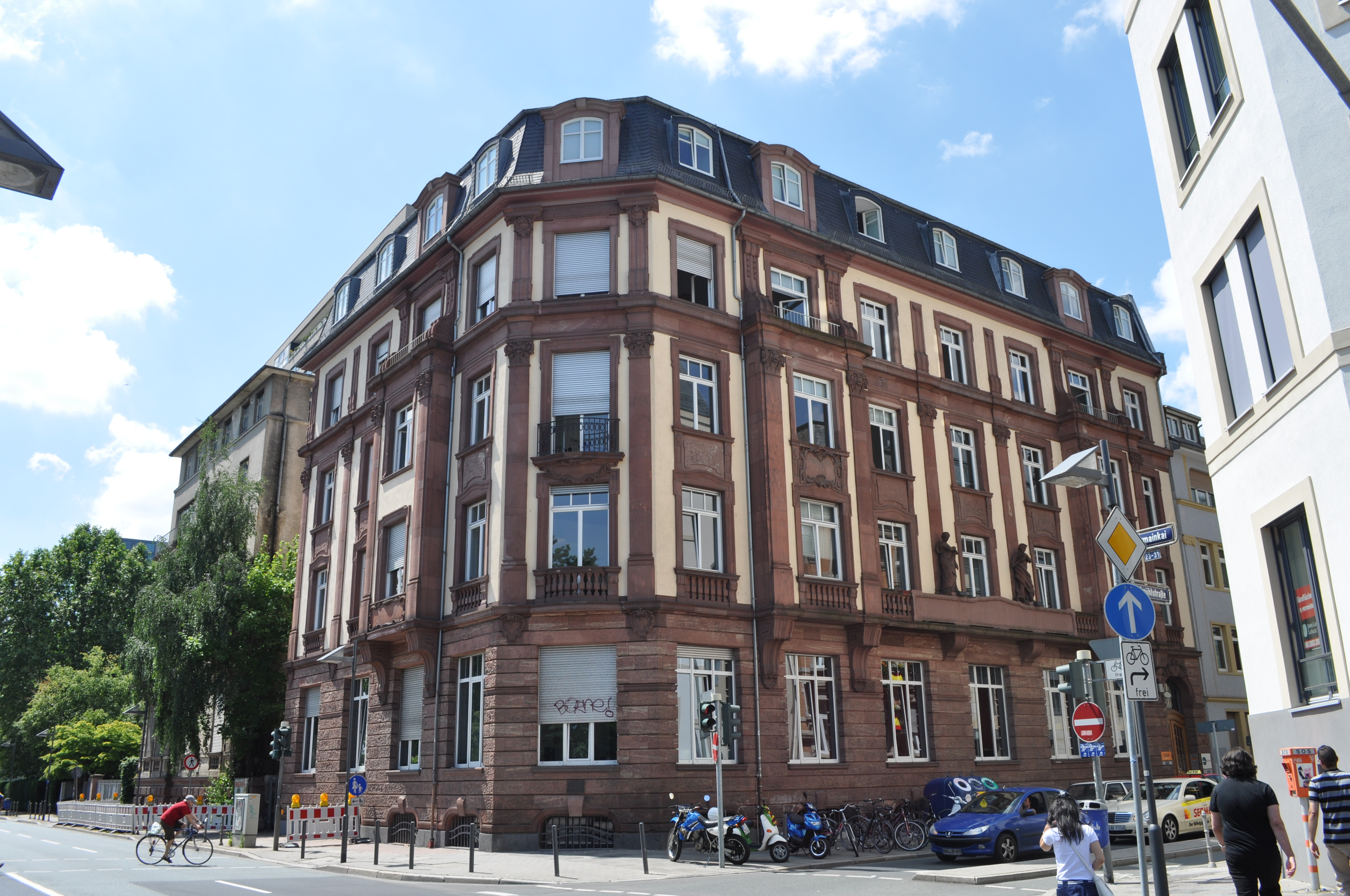 Frankfurt am Main, Windmühlstraße 1; ehemaliges Kochkunstmuseum; erbaut 1908-1909 nach Entwurf der Frankfurter Architekten Vietze & Helfrich; seit 1984 unter Denkmalschutz